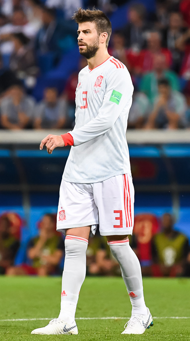 Хет-трик Роналду приносит Португалии ничью в пиренейском дерби